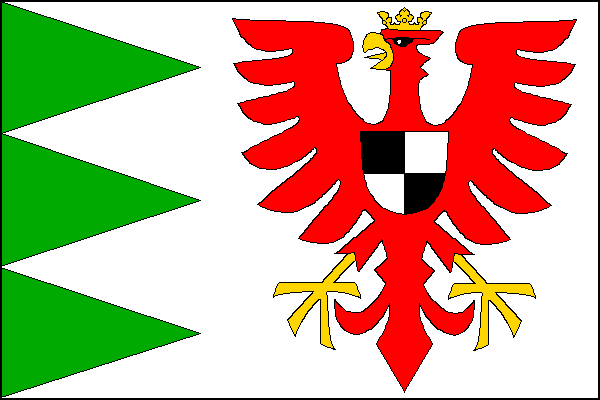 Bílý list se třemi zelenými žerďovými klíny s vrcholy v první třetině délky listu. Ve střední a vlající části červená orlice se žlutou korunou a s černoᾢbíle čtvrceným štítkem na hrudi. Poměr šířky k délce listu je 2:3.